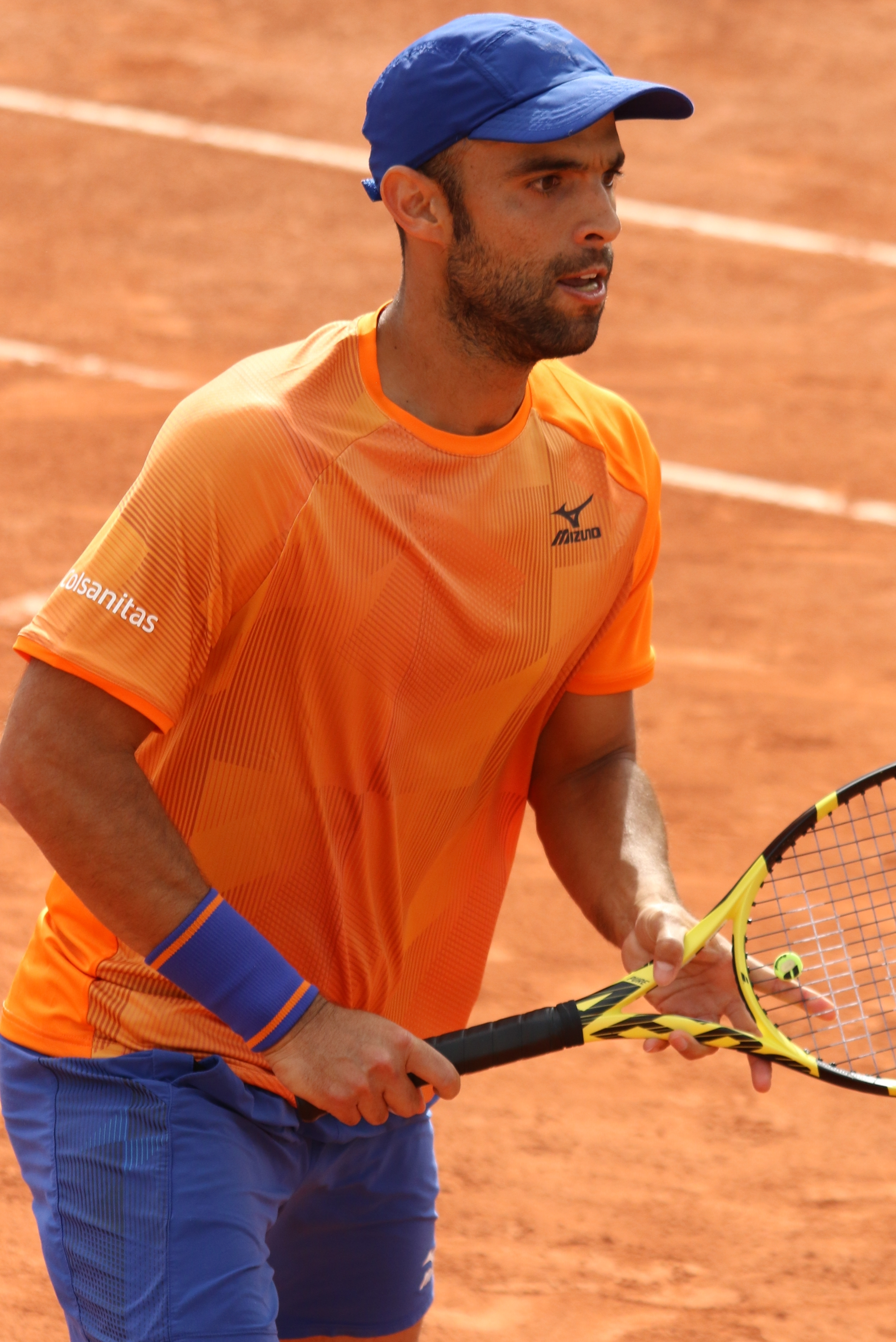 Cabal RG19 (26)